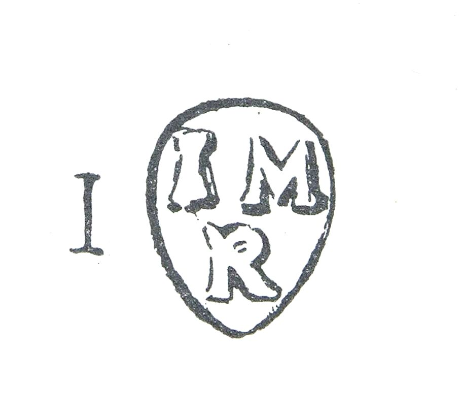 Meisterzeichen au dem Gobelet d'André Falquet (Kunstgegenstand)